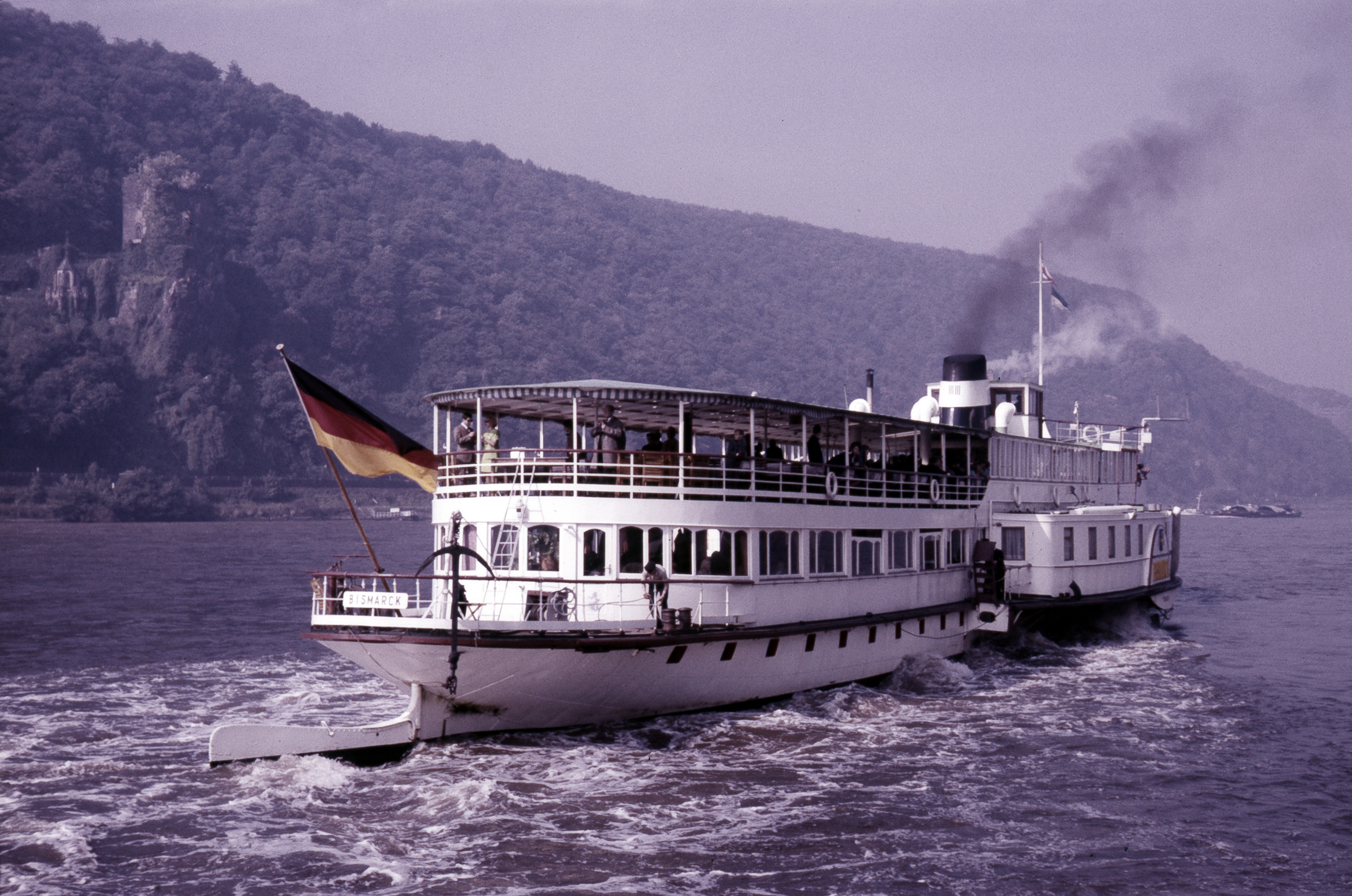 Der Raddampfer Bismarck in voller Fahrt.